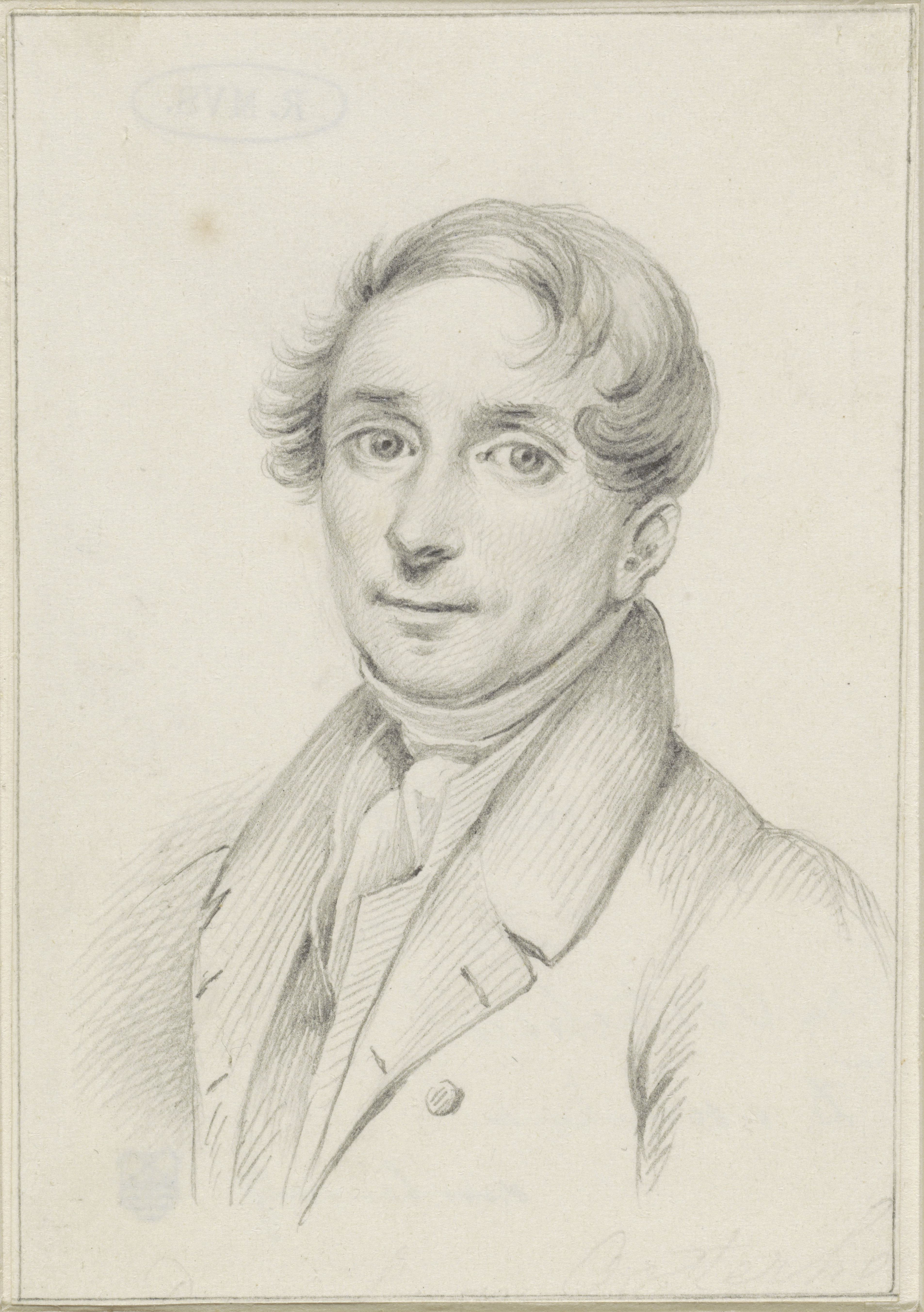 Zelfportret van Dirk van Oosterhoudt